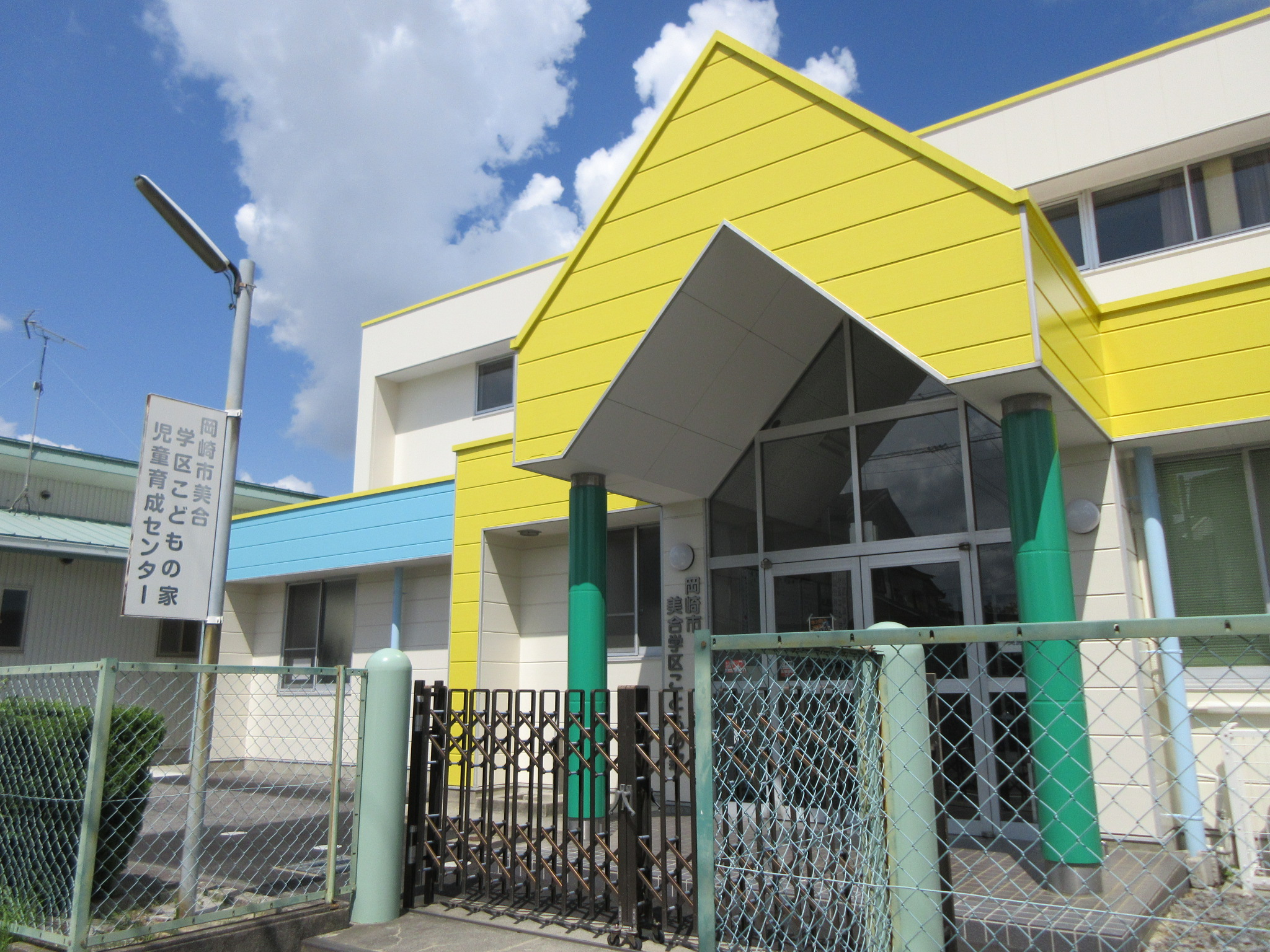 岡崎市美合学区こどもの家（岡崎市岡町）